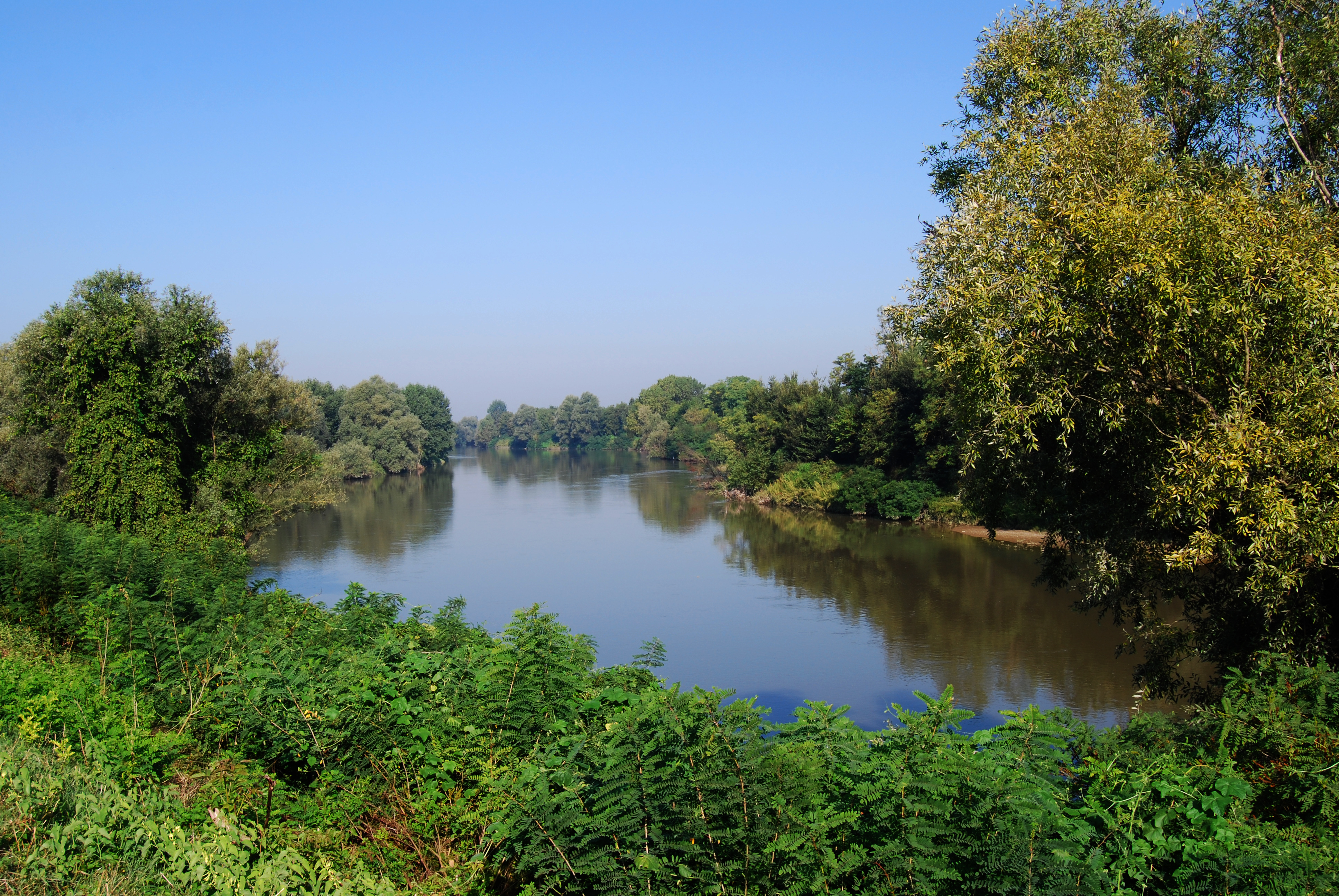 Calvatone, Riserva naturale Le Bine. This is a photo of a monument which is part of cultural heritage of Italy. The authorisation for taking photos of this object was provided by the World Wide Fund for Nature Italy.